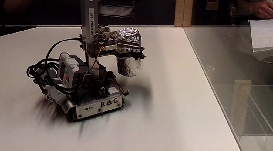 Un robot solleva la lattina dopo averla individuata durante una gara di Rescue A